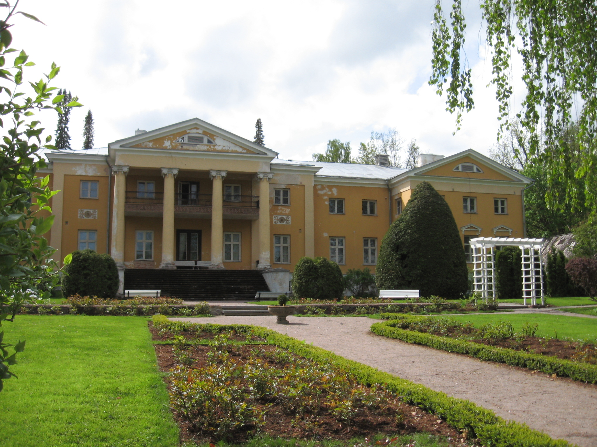 Sillapää loss Räpinas, Tartumaal, Eestis.